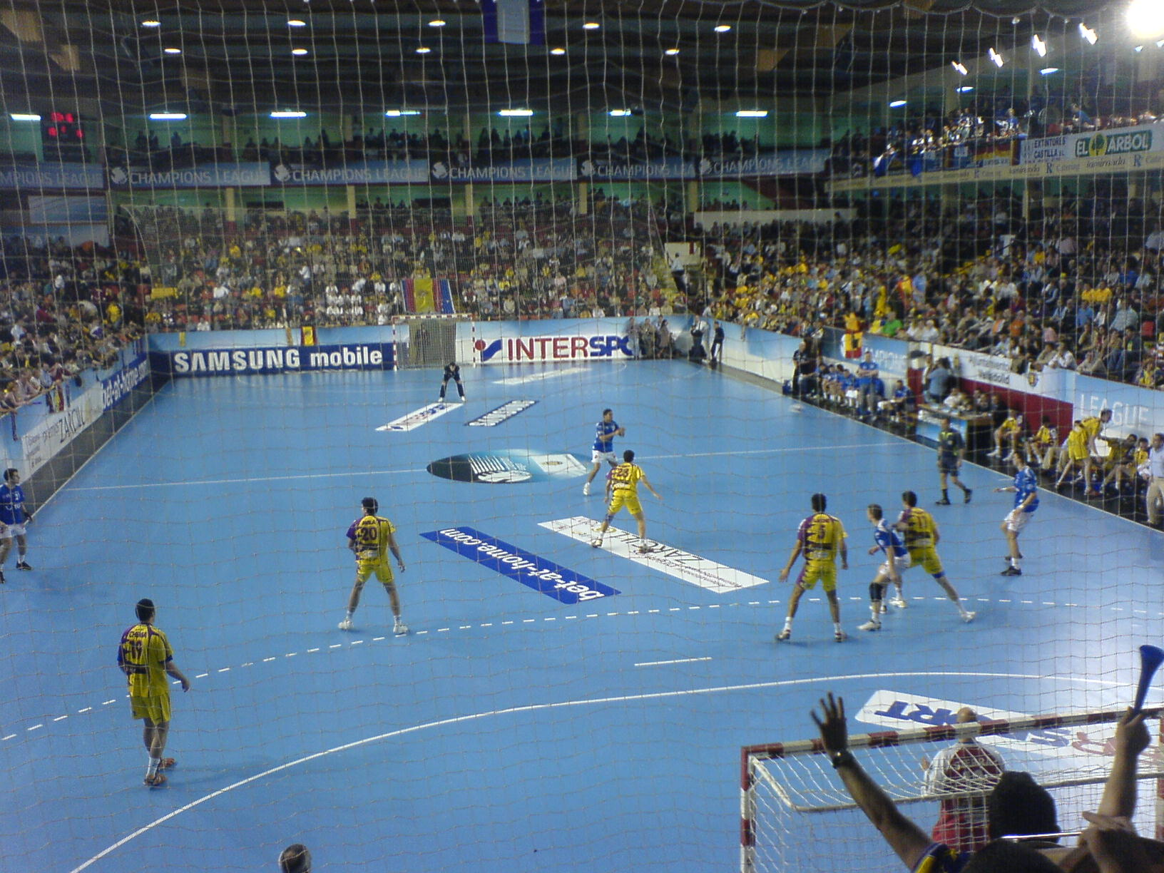 Partido del BM Valladolid